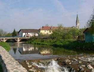 Ville de Valdoie (Territoire de Belfort), la rivière 'la Savoureuse' et l'église. Photo prise en mai 2004 par LP90 Licence GFDL LP90